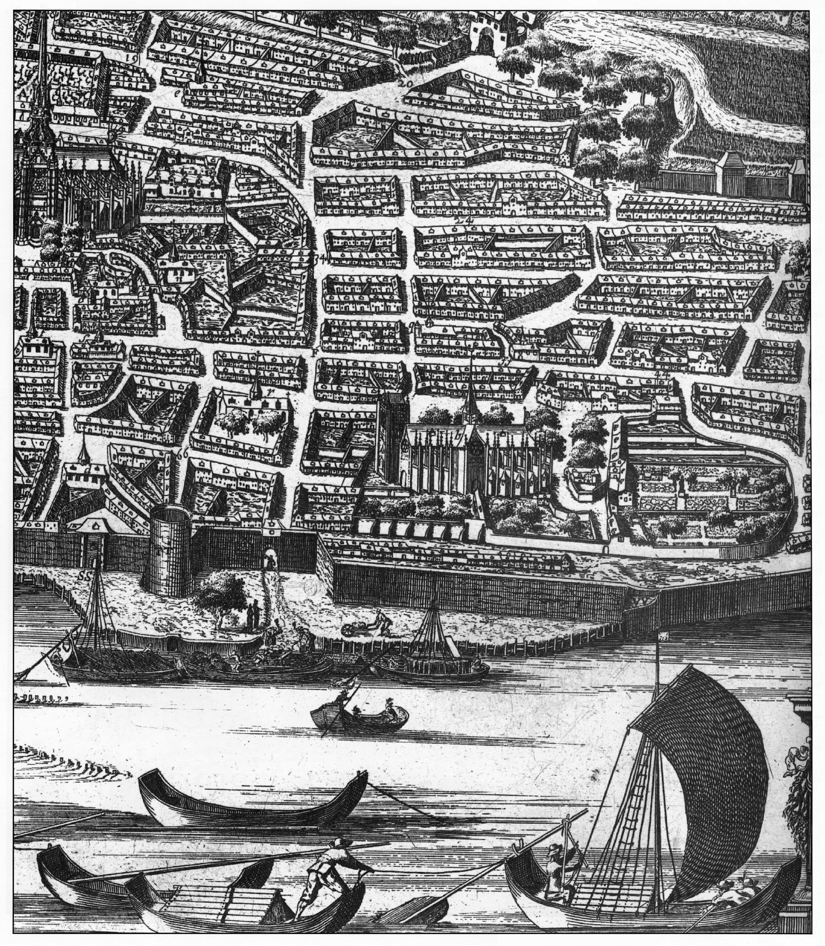 Détail de la « vue d'Orléans » par Gilles Hotot, dédiée au milieu du XVIIe siècle à Messire Nicolas du Fos, chanoine de Saint-Aignan Cette vue représente divers bateaux sur la Loire, le quai du port amont et la ville d'Orléans